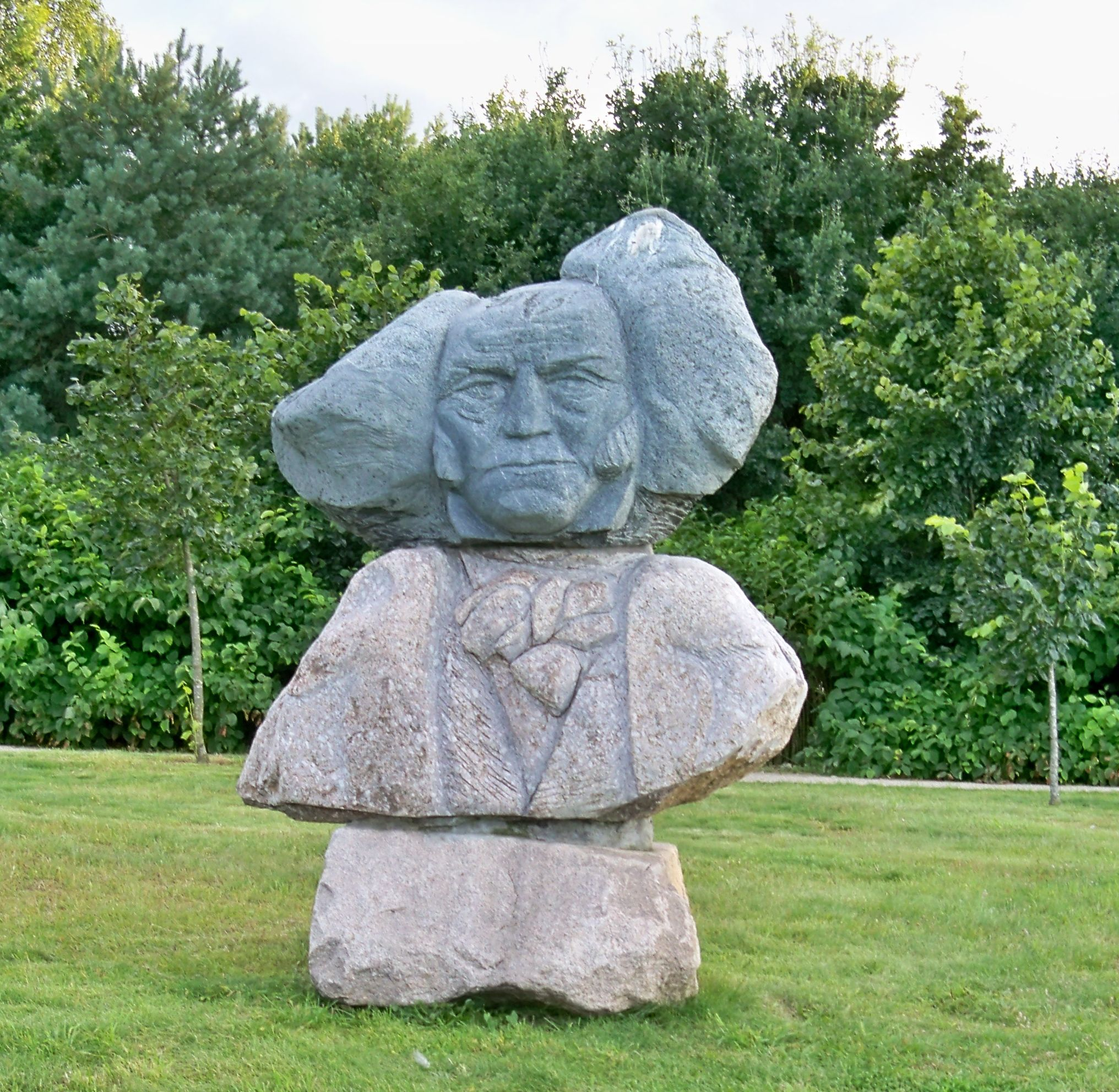 Park rzeźb "Wielcy Gdańszczanie" powstałych podczas XXVII Pleneru Rzeźby z Granitu Kaszubskiego (1-30 września 2008) w skansenie we Wdzydzach Kiszewskich. Prezentowany w Parku Reagana w Gdańsku. Artur Schopenhauer (rzeźb. Bolesław Marschall)